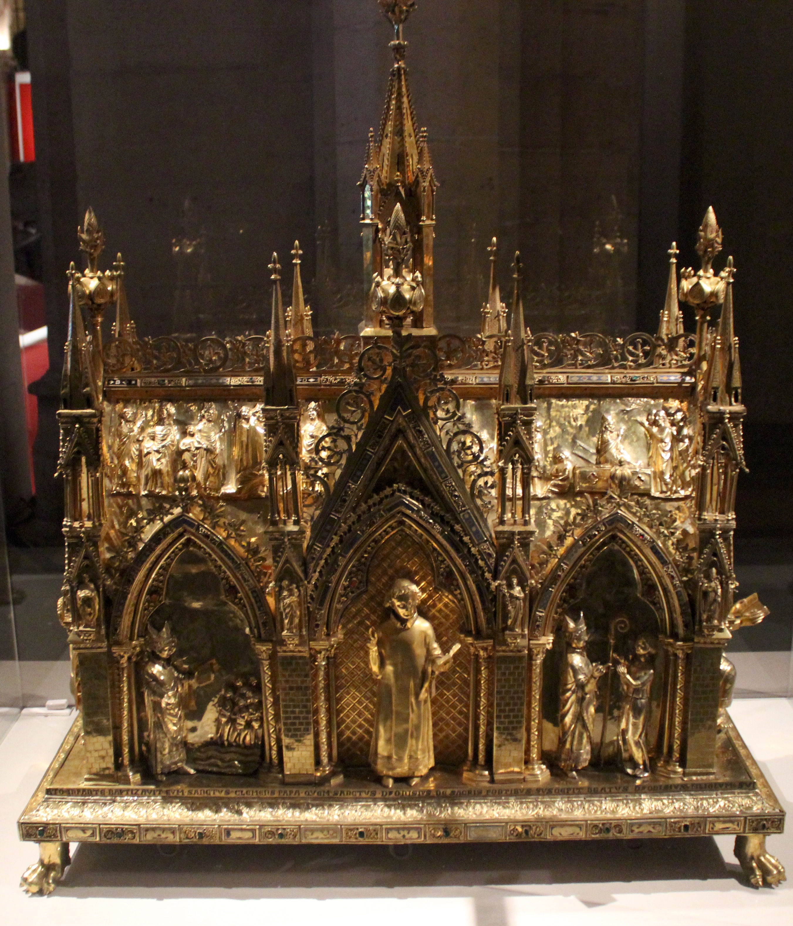 Evreux. Arca de St. Taurin.